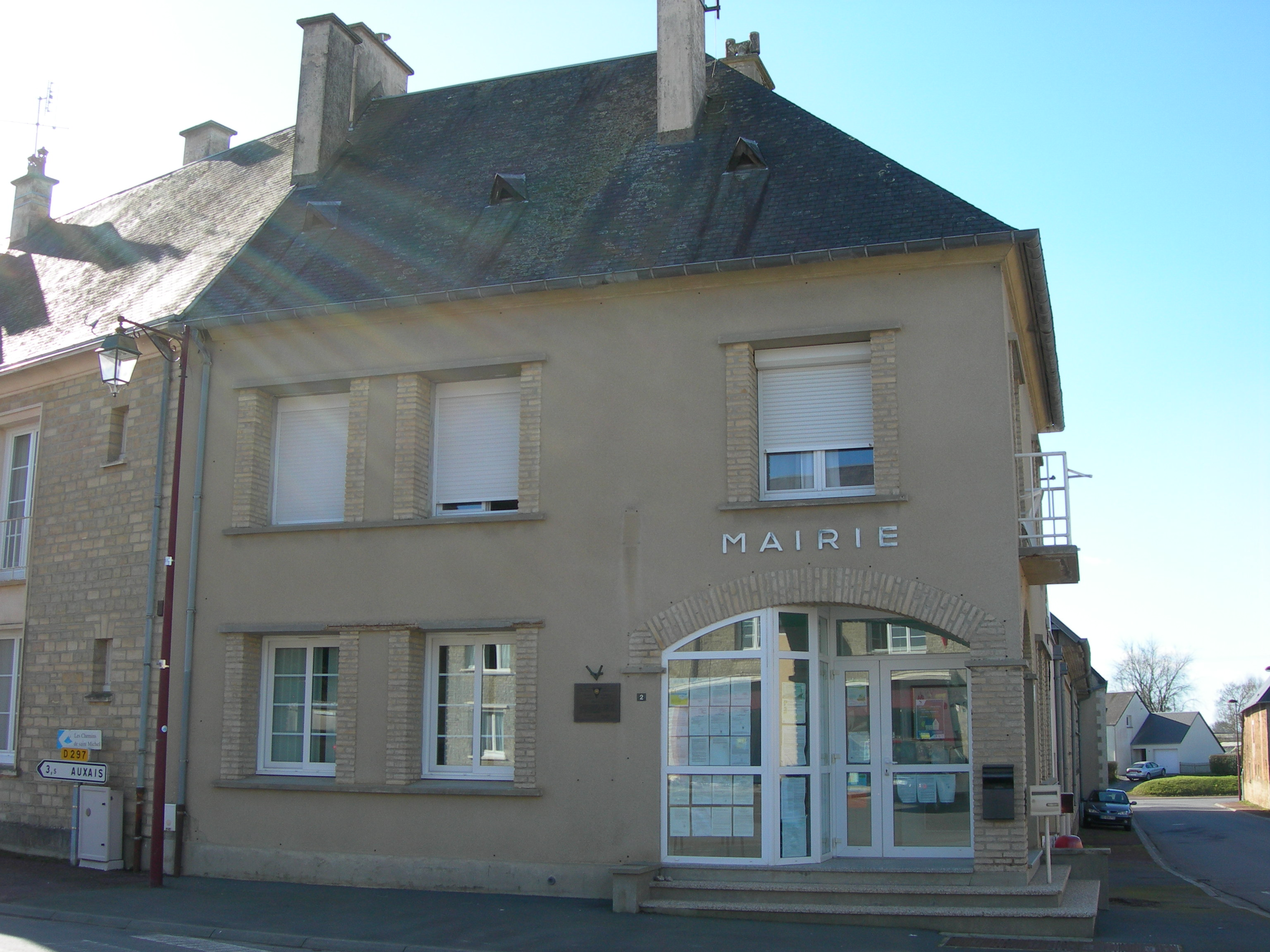 Mairie de la commune de Terre-et-Marais (Sainteny) dans la Manche